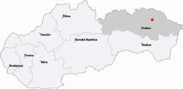 Brusnica in Slovakia